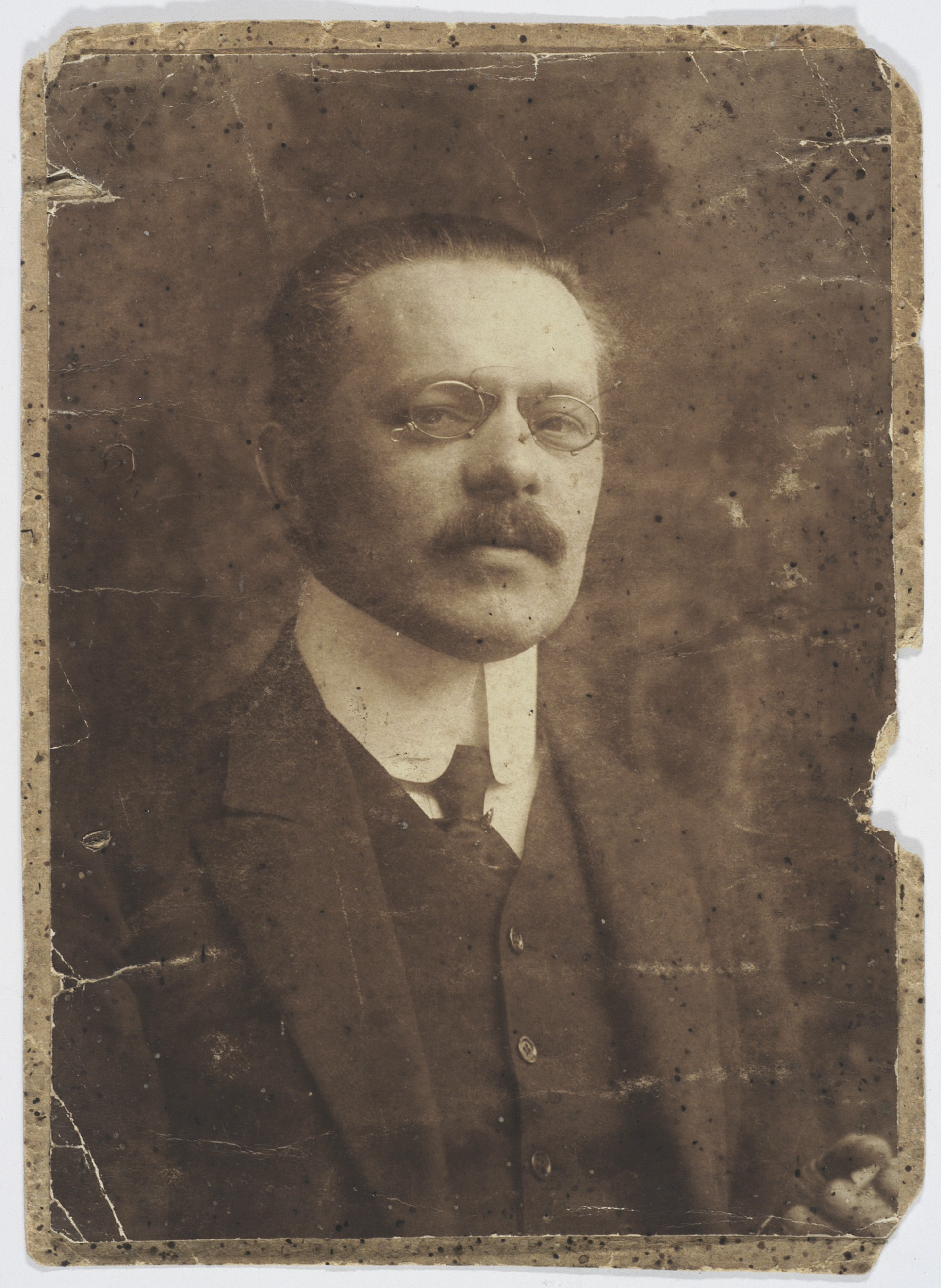 Henryk Melcer Szczawiński, 1899 r.